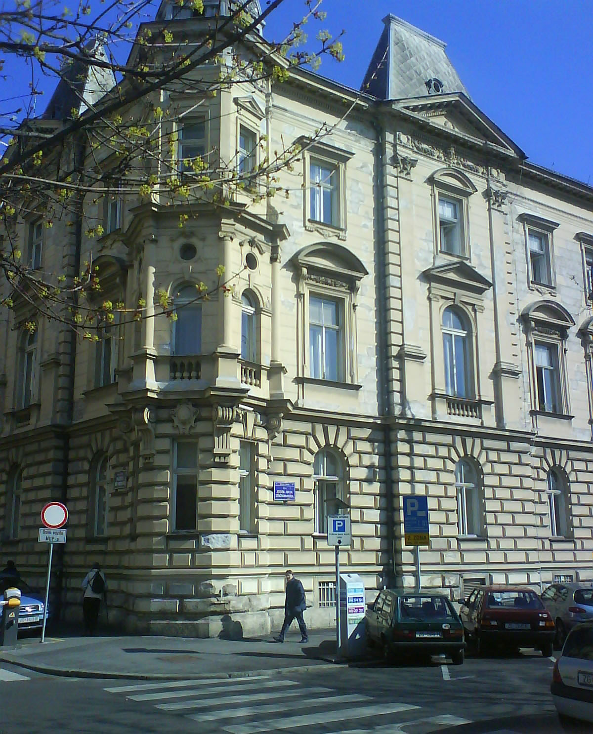 Zgrada Matice hrvatske u Zagrebu